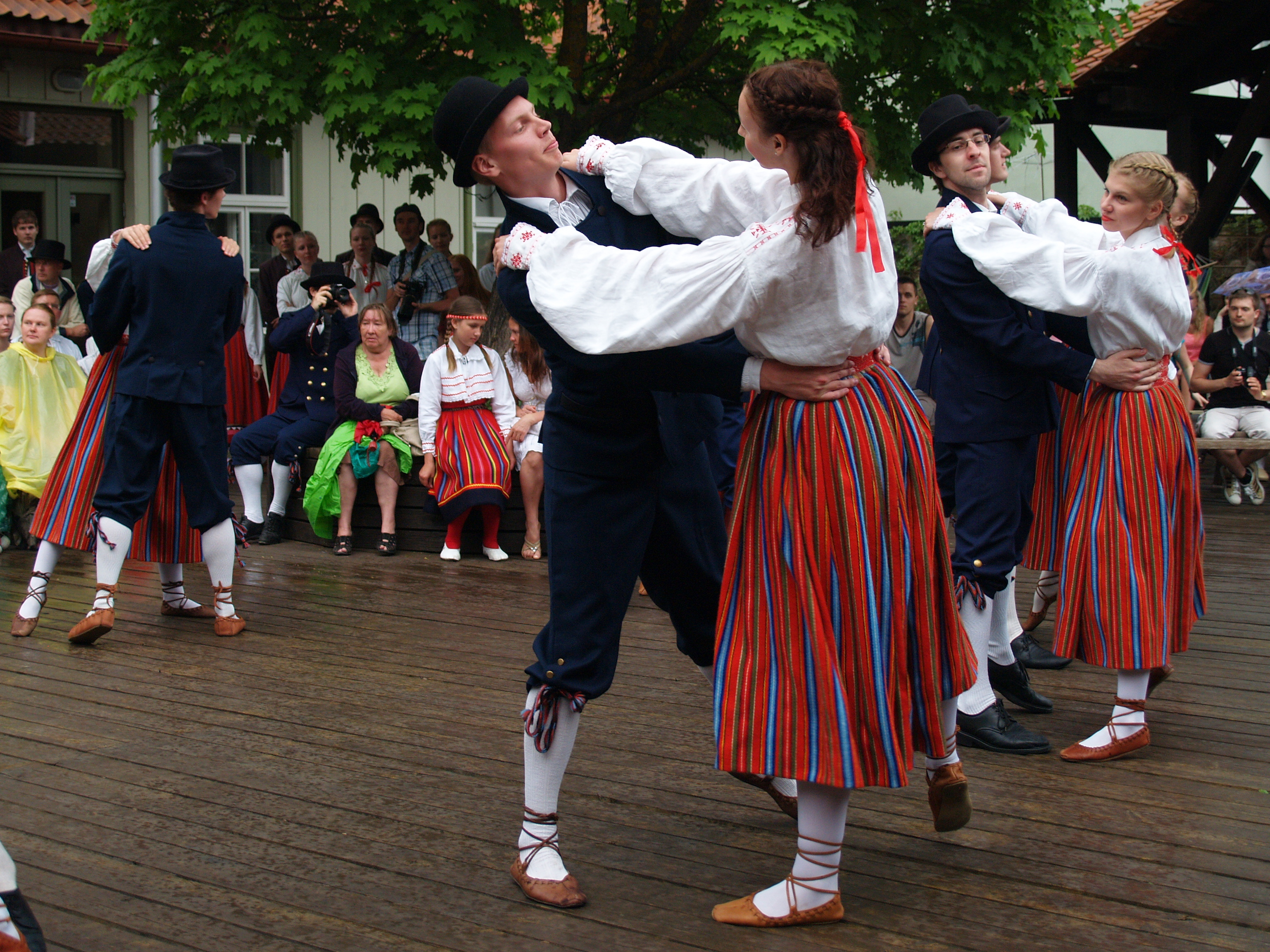 Tartu Ülikooli Rahvakunstiansambli kevadkontsert Antoniuse õues.